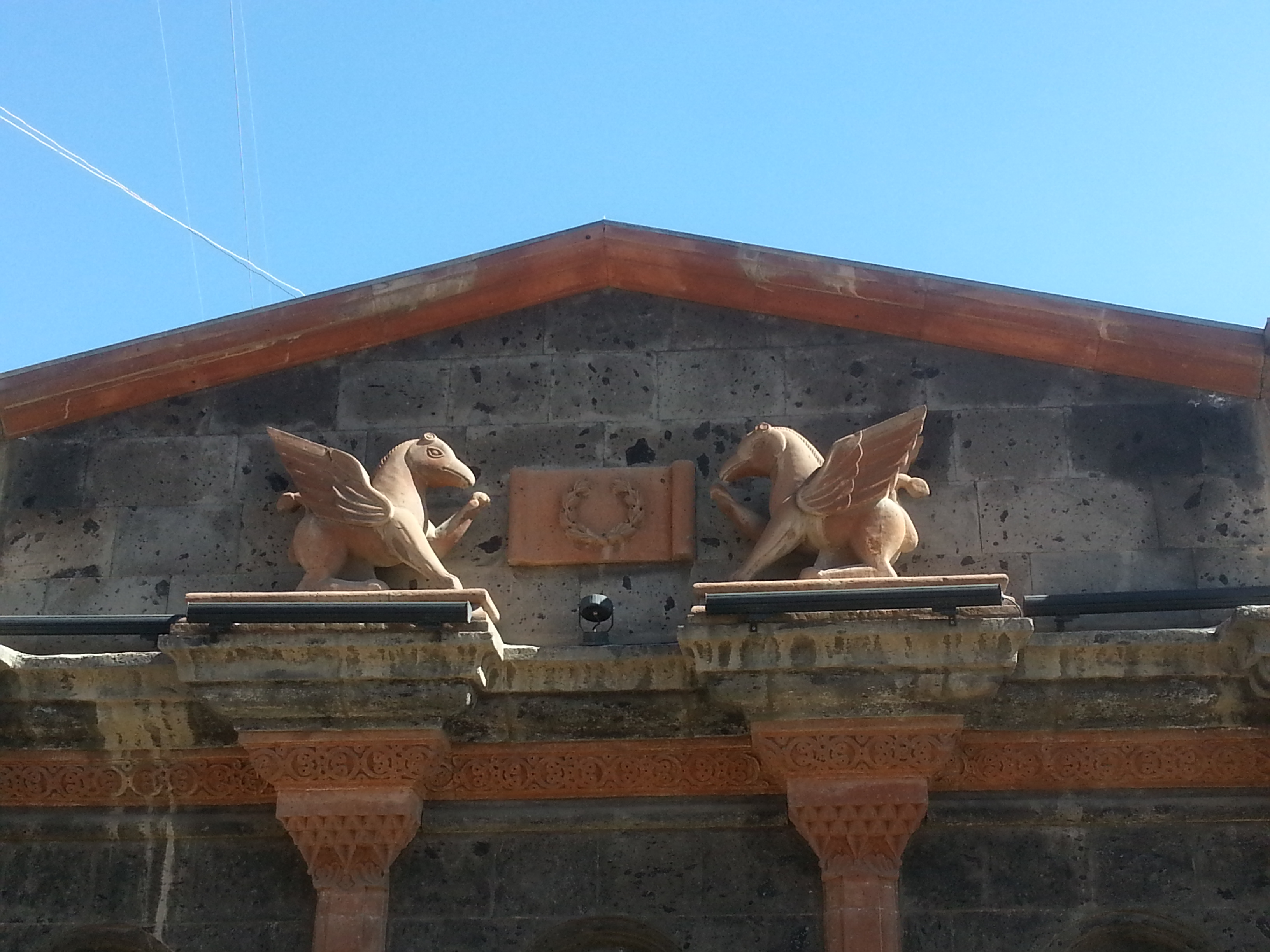 Պոլոզ Մուկուչ գարեջրատան ճակատի արծվառյուծները 1/4.909